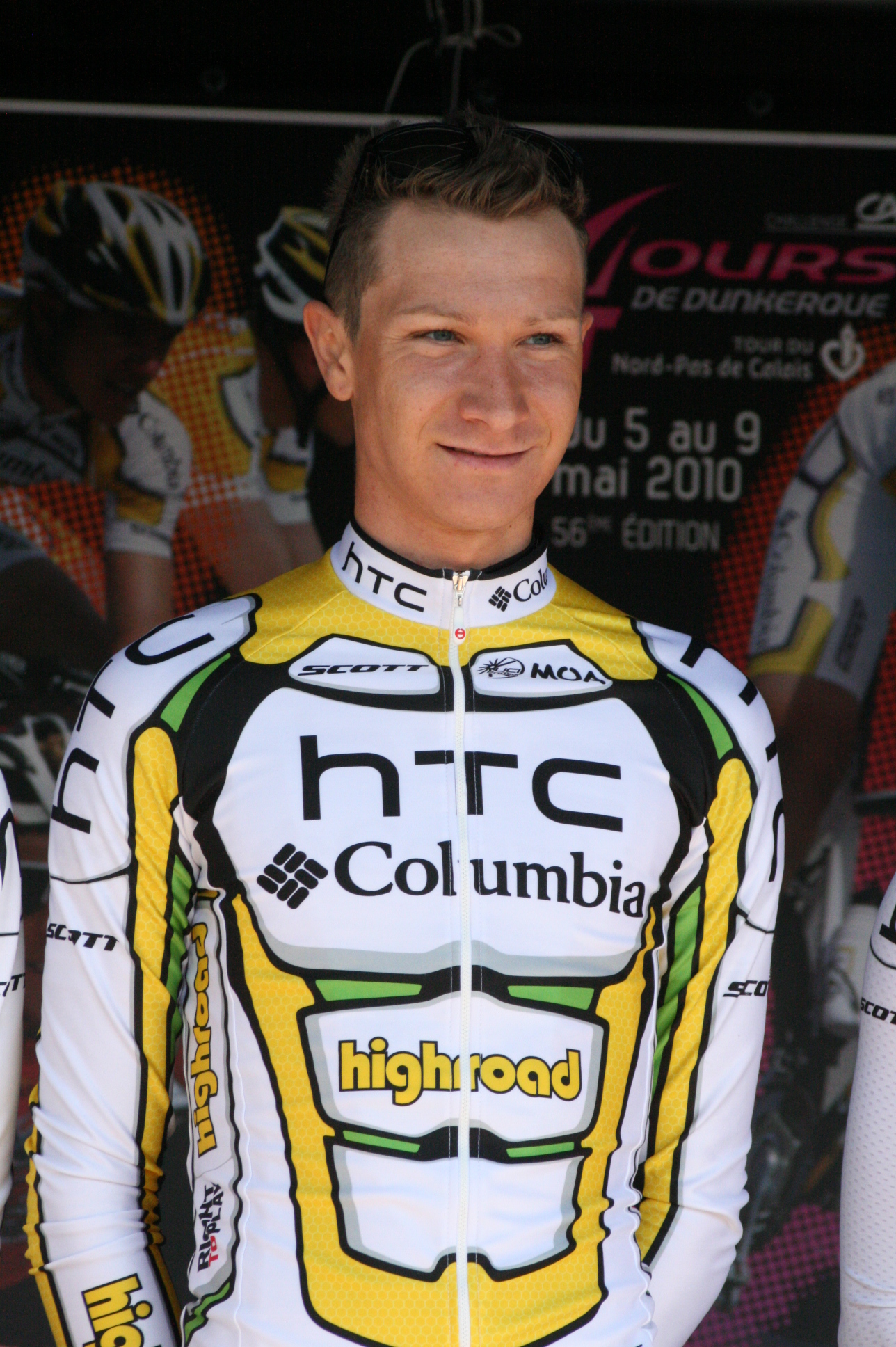 Patrick Gretsch, lors de la présentation des équipes des 4 jours de Dunkerque 2010